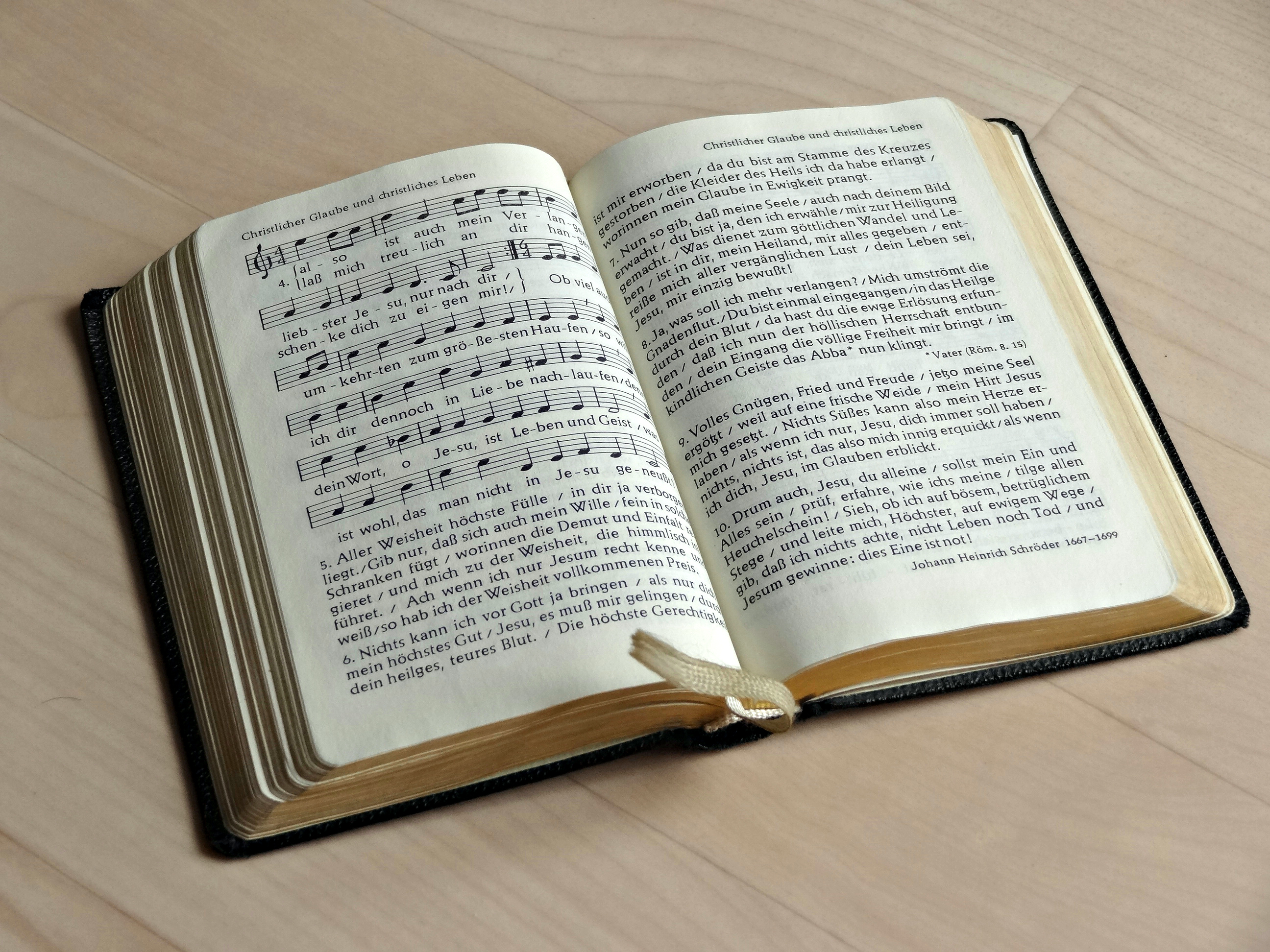 Verlag der Evangelischen Kirche in Hessen und Nassau: Der Herr ist mein Hirte, Gesangbuch, Evangelisches Kirchengesangbuch für die Evangelische Kirche in Hessen und Nassau, 17. Auflage, Herausgegeben auf Beschluß der Ersten Kirchensynode der Evangelischen Kirche in Hessen und Nassau vom 14. April 1950, Darmstadt, 1962